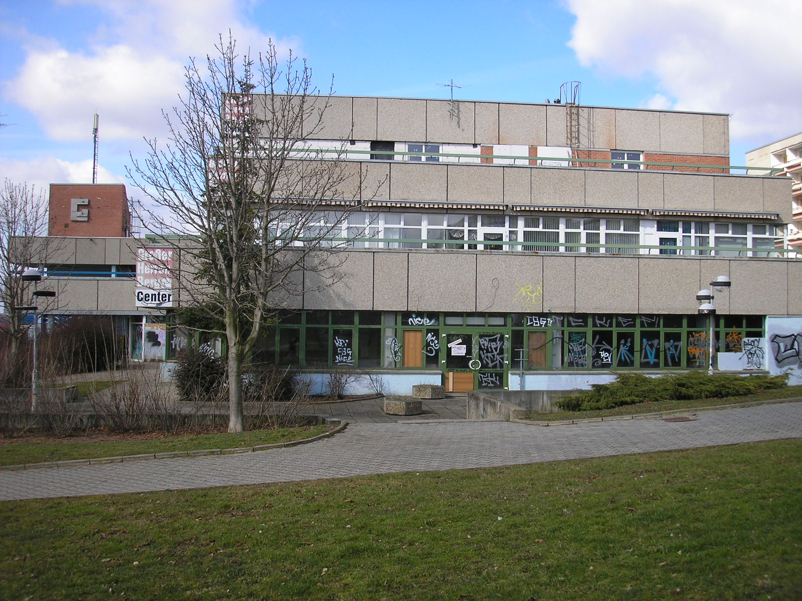 Das ehemalige Einkaufszentrum „Großer Herrenberg“ im gleichnamigen Plattenbaugebiet in Erfurt (Thüringen). Der Gebäudekomplex wurde abgebrochen und der Bauplatz neu bebaut.